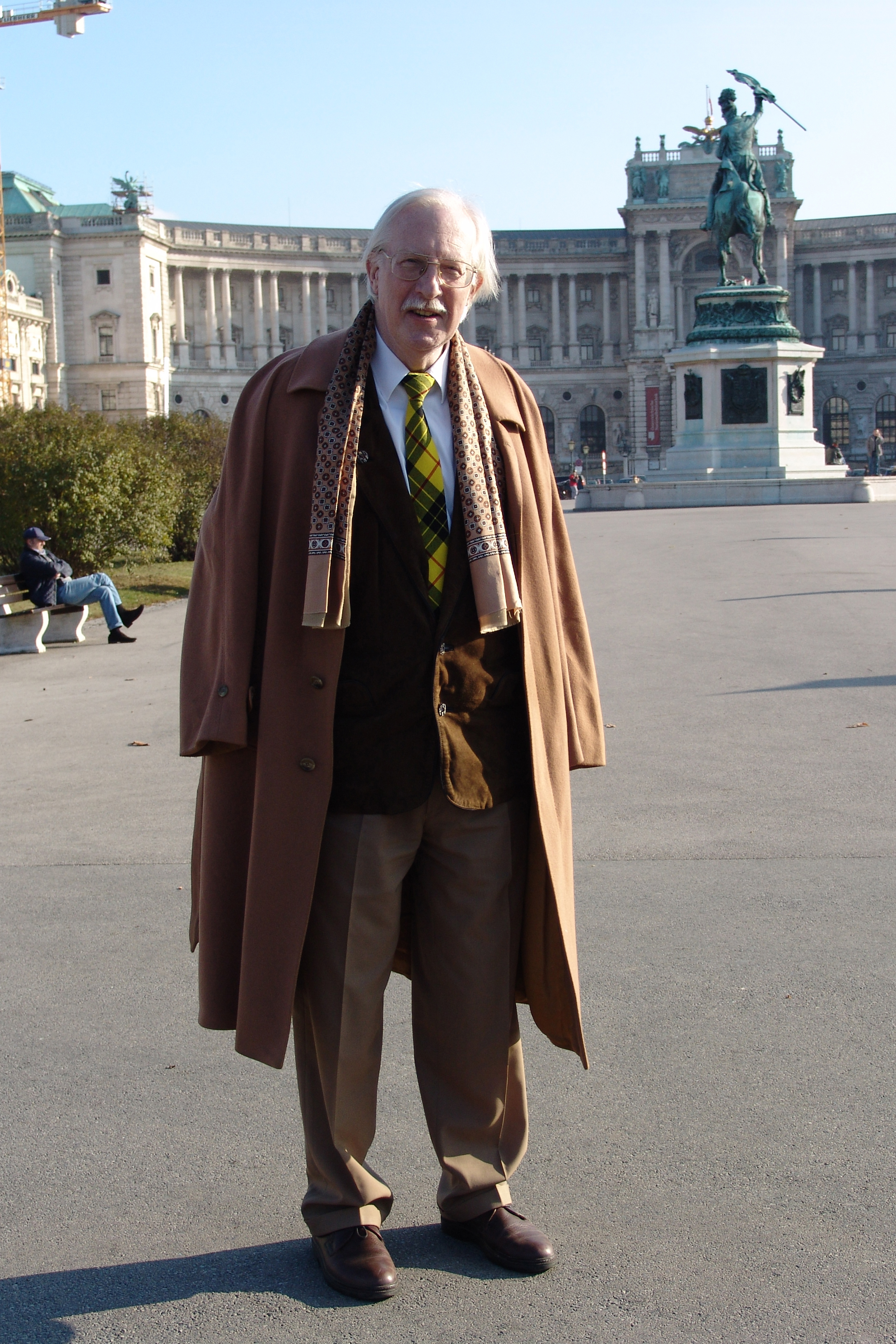 Prof. Dr. Karl Hardach am Heldenplatz in Wien